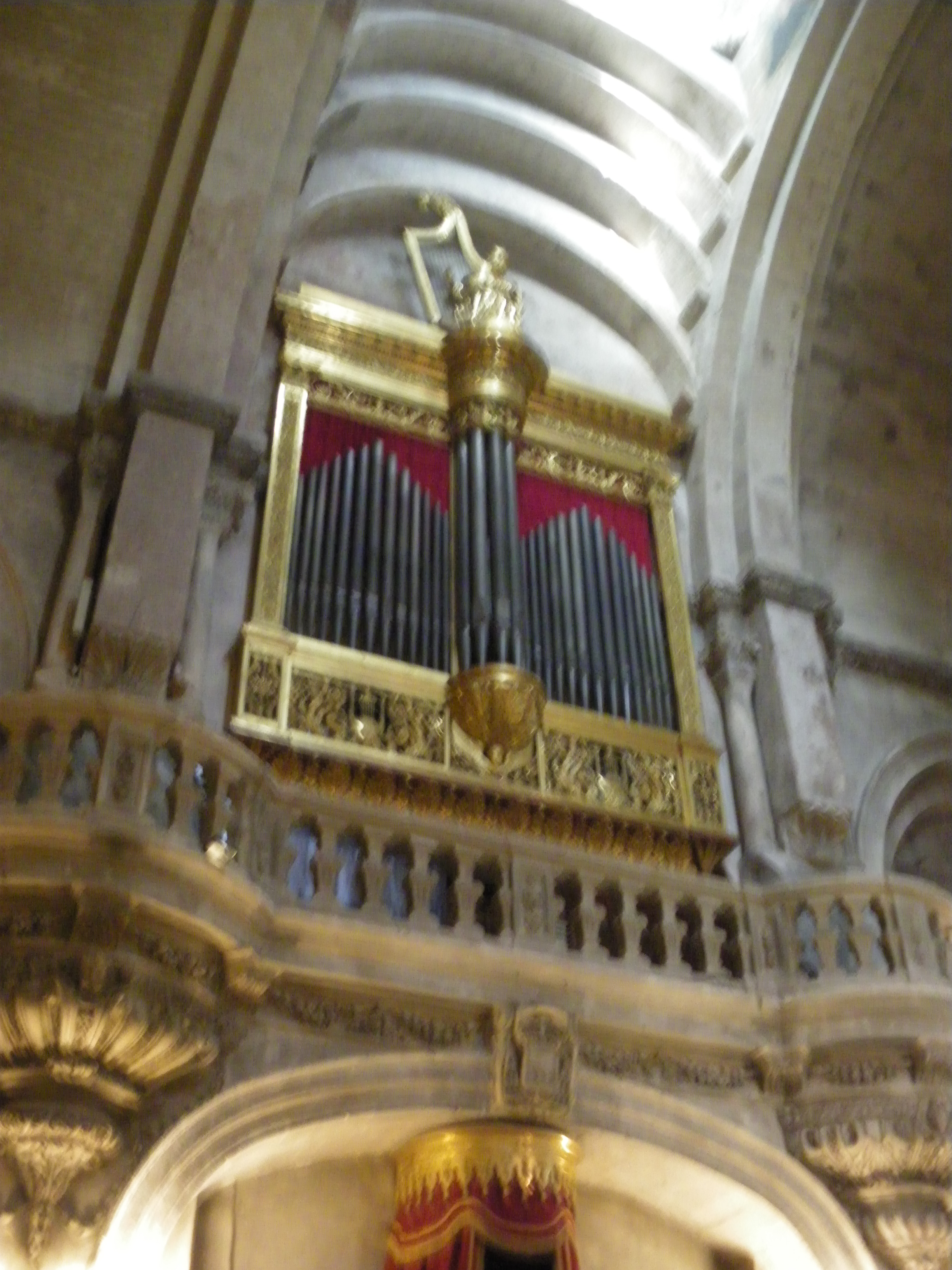 Intérieur Notre Dame des Doms, Avignon, Vaucluse